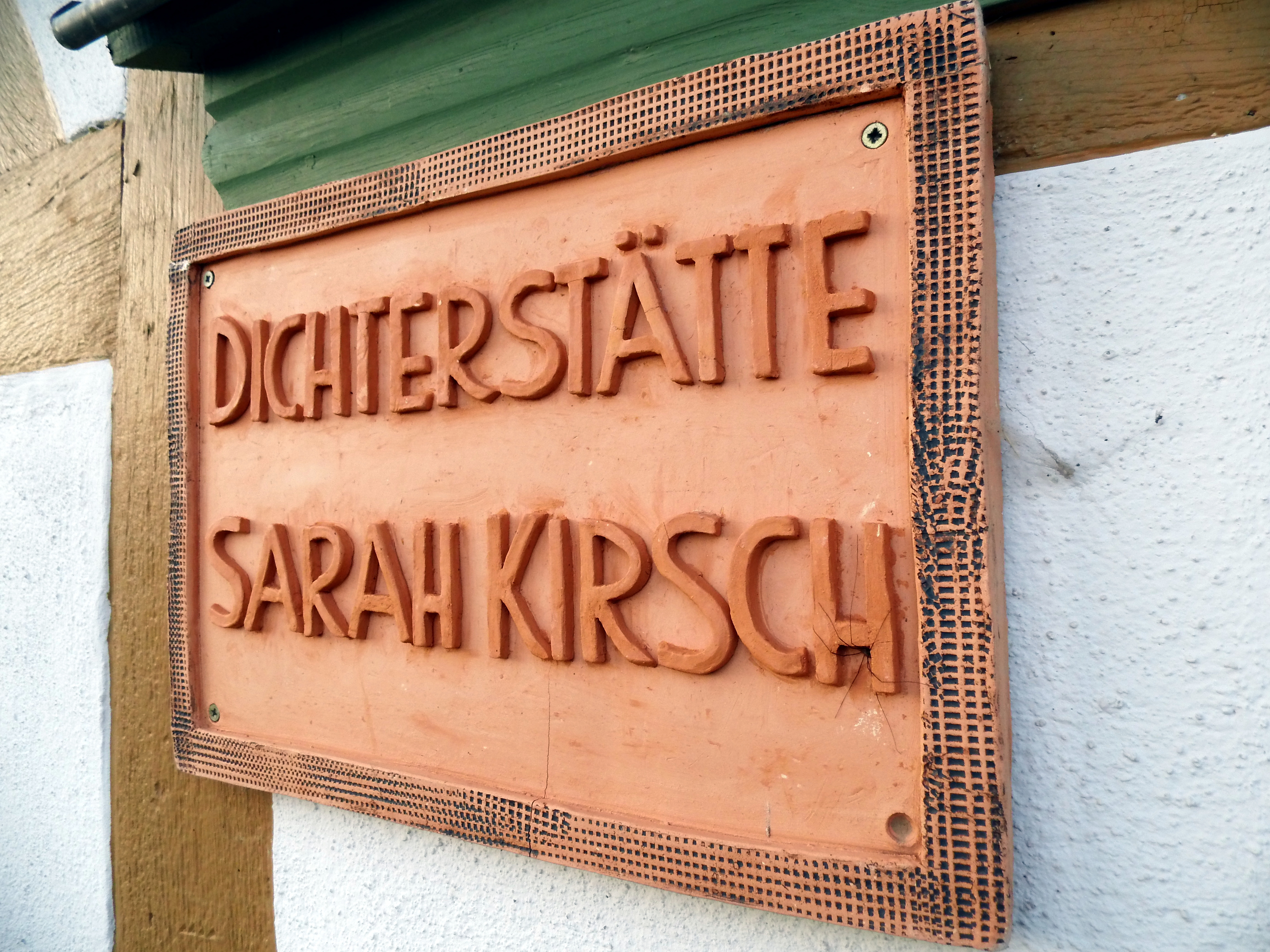 Fassadenschild am einstigen Pfarrhaus in Limlingerode, heute: Dichterstätte Sarah Kirsch. Foto: Holger Zürch